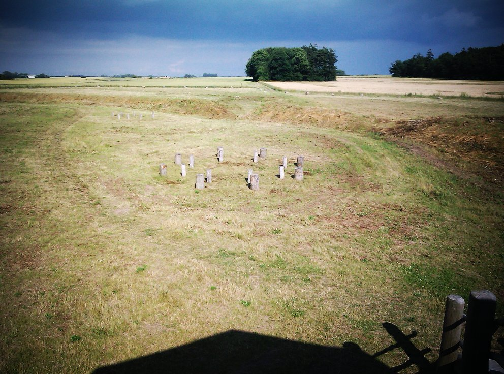 Woodhendge sun temple, Rispebjerg, Bornholm, Denmark